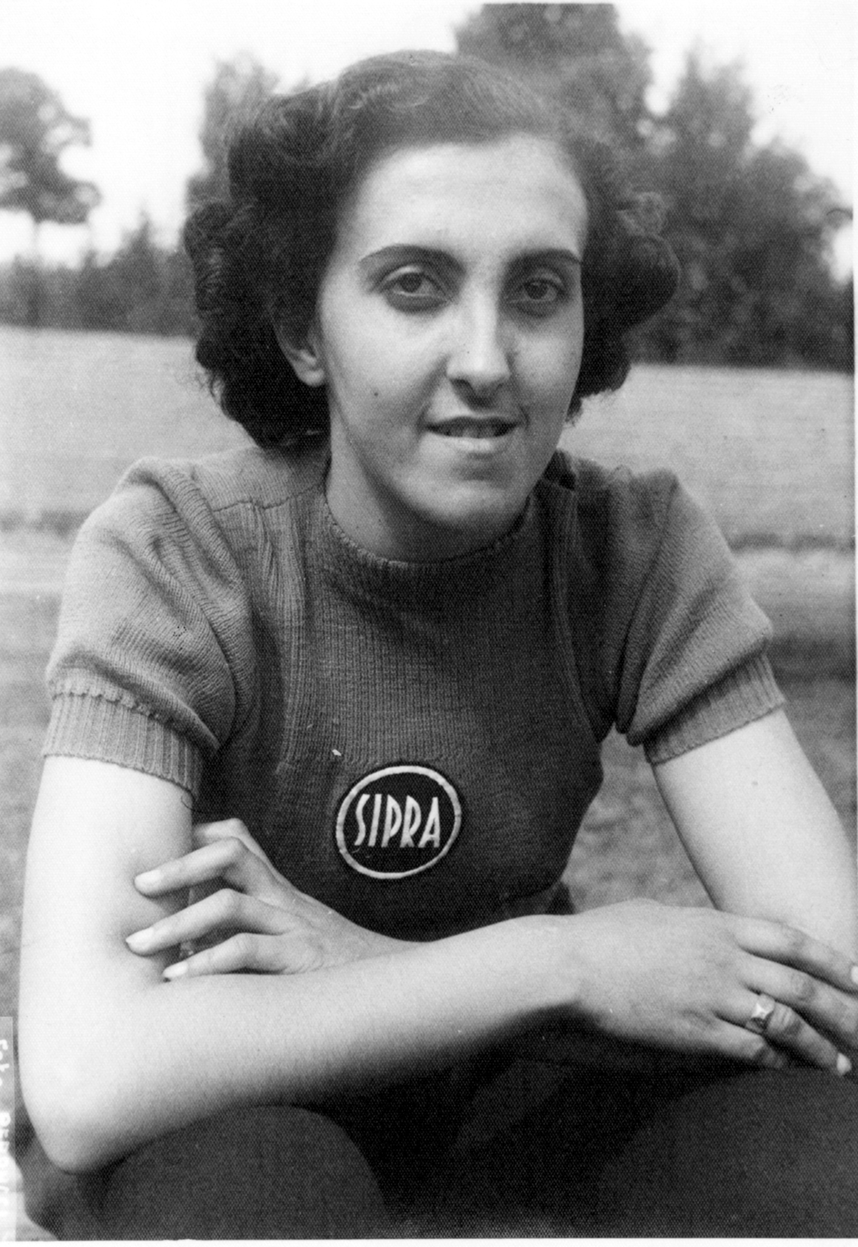 Riunione nazionale femminile all'Arena di Milano, luglio 1947